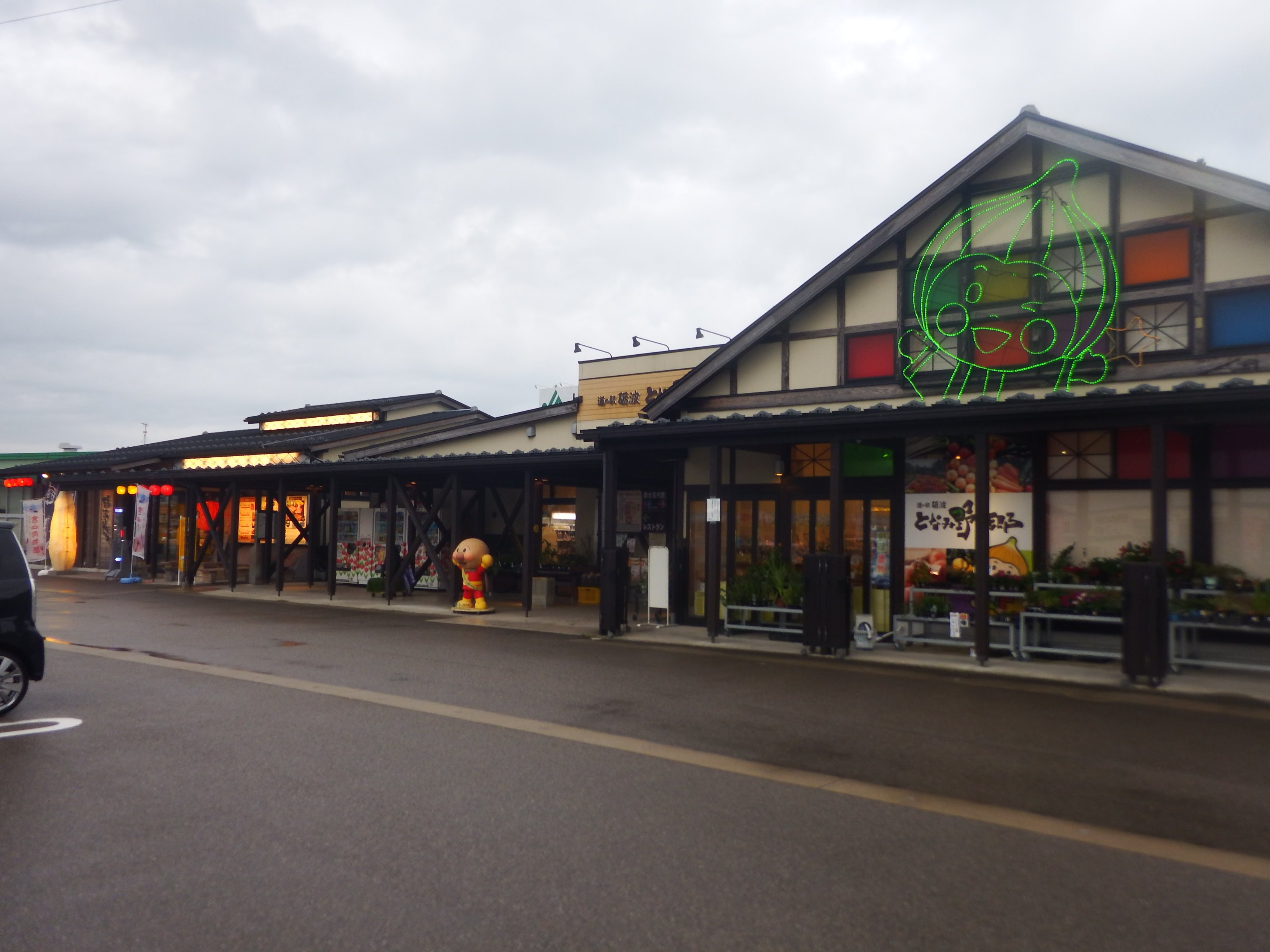 道の駅砺波の商業施設部分です